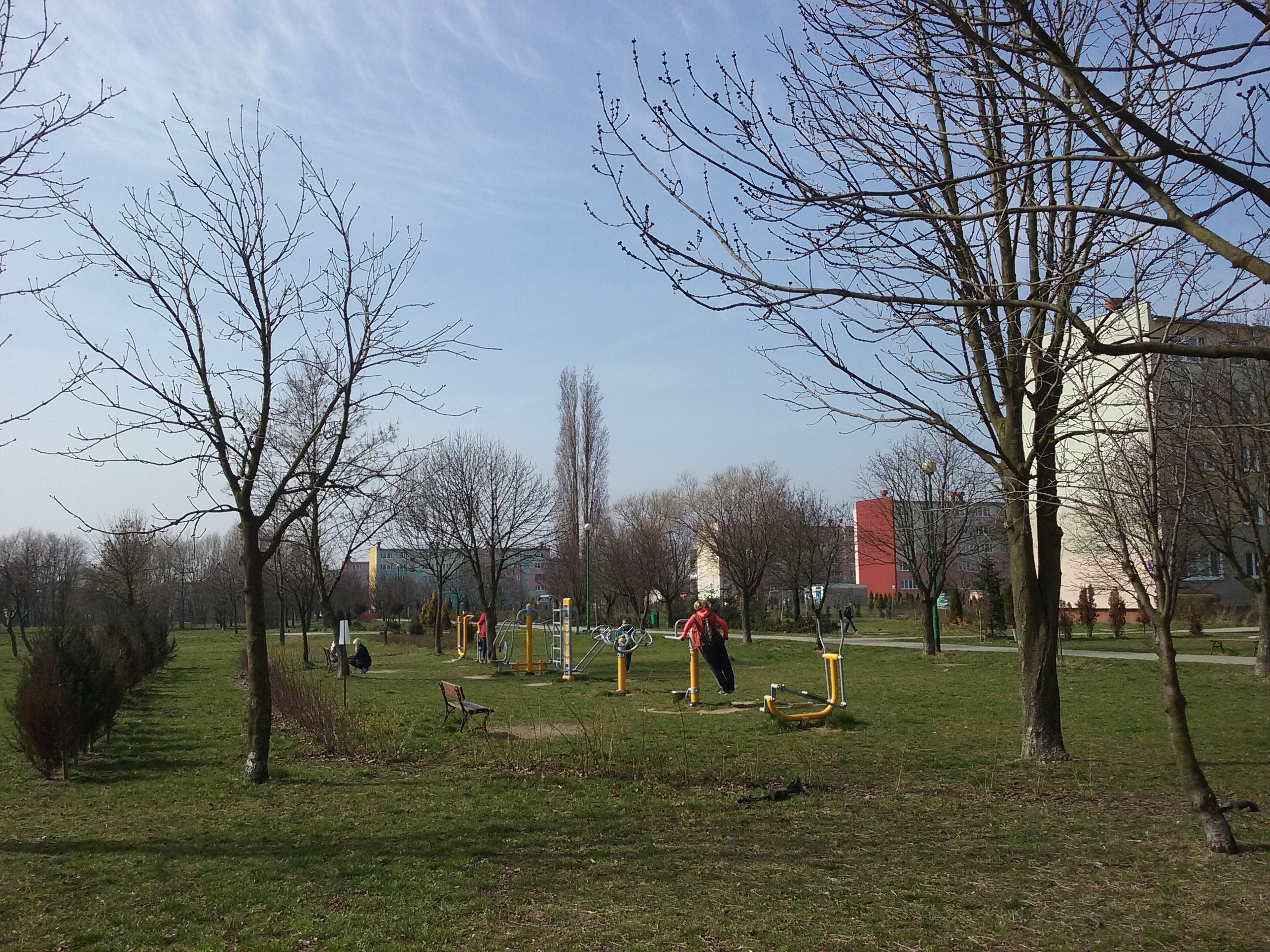 Tomaszów Mazowiecki w województwie łódzkim, PL, EU. Fragment Parku Centralnego na największym tomaszowskim osiedlu - Niebrów. CC0